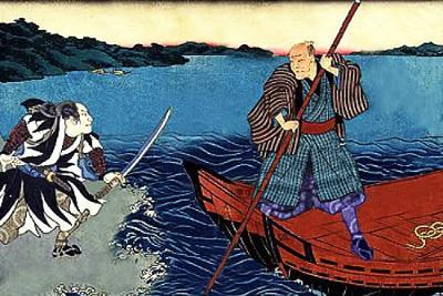 Illustration du combat de Tsukahara Bokuden sur le lac Biwa.